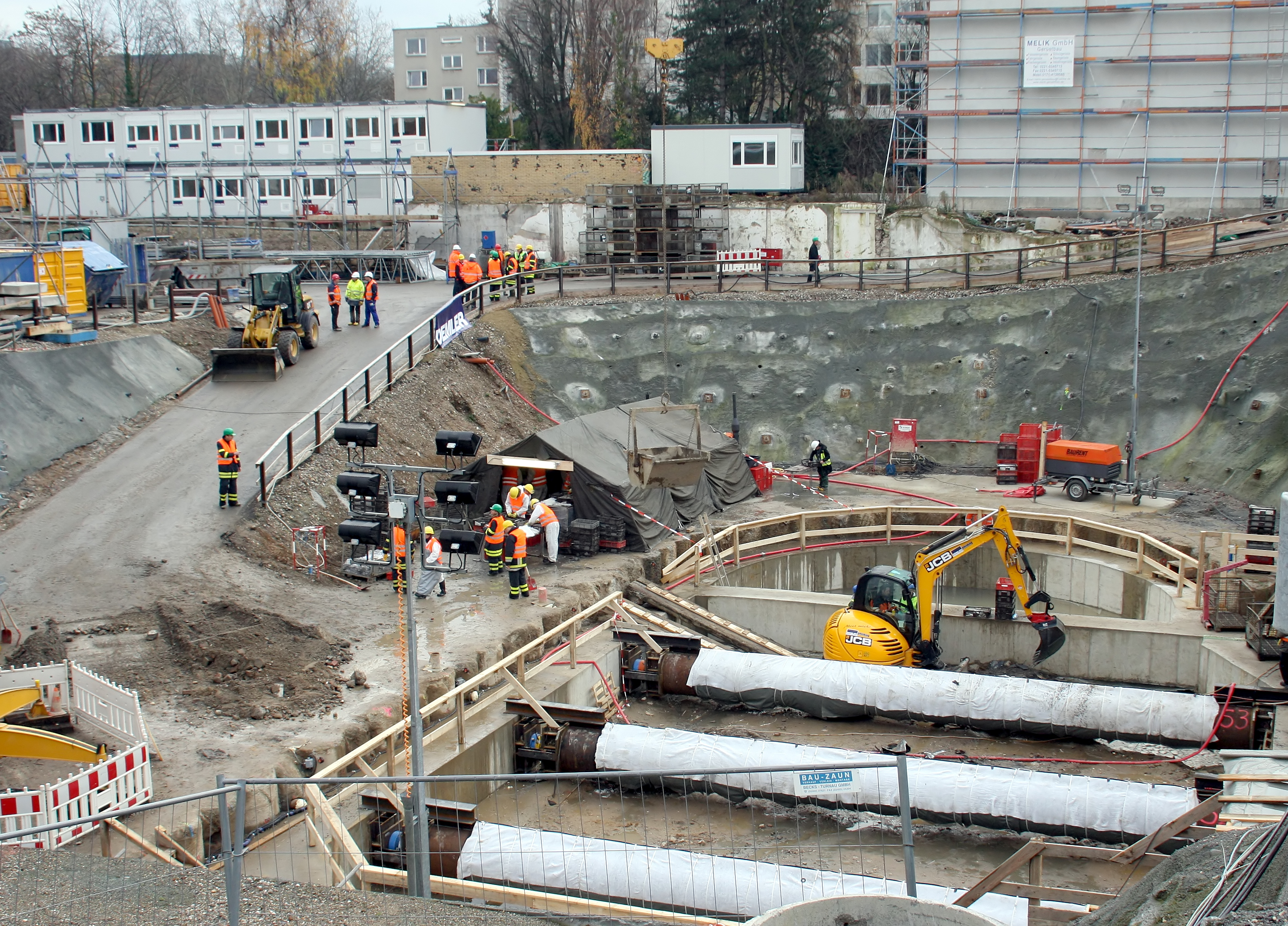 Historisches Archiv der Stadt Köln: Bergungsbauwerk. Die sich noch im Untergrund befindlichen Archivalien werden gehoben und erstversorgt.